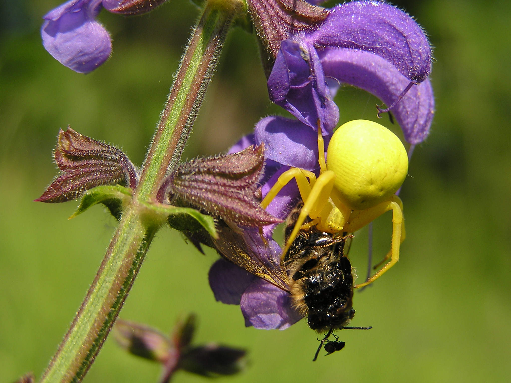 Misumena vatia